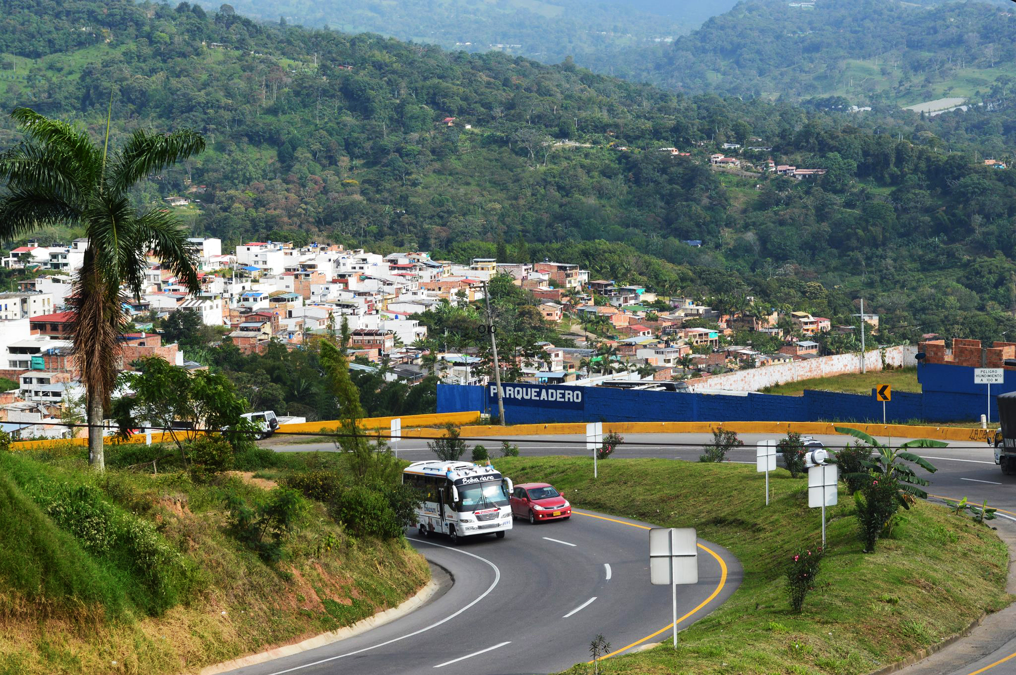 PANORÁMICA DE SILVANIA - Alejandro Vargas vasquez